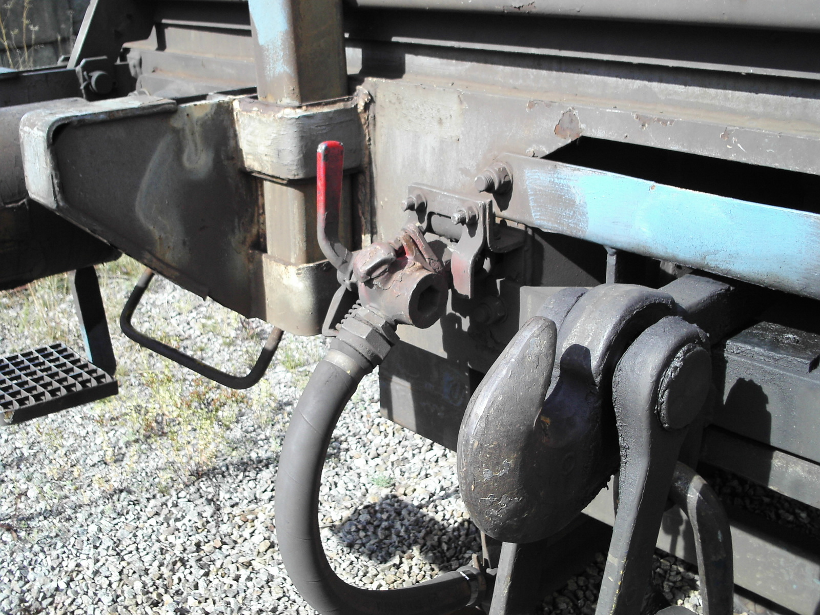 Bromsventil till huvudledningen